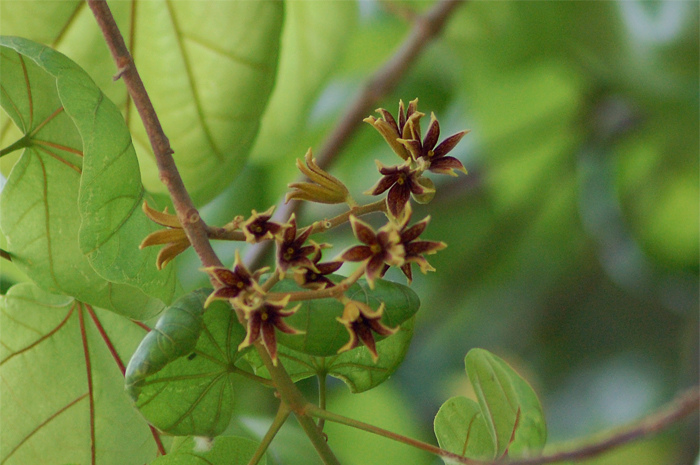 Pterygota alata (syn. Sterculia alata) from Sterculiaceae.